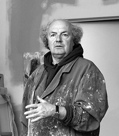 Osmar Osten in seinem Atelier bei den Dreharbeiten zum Film WARUM BIN ICH SO.